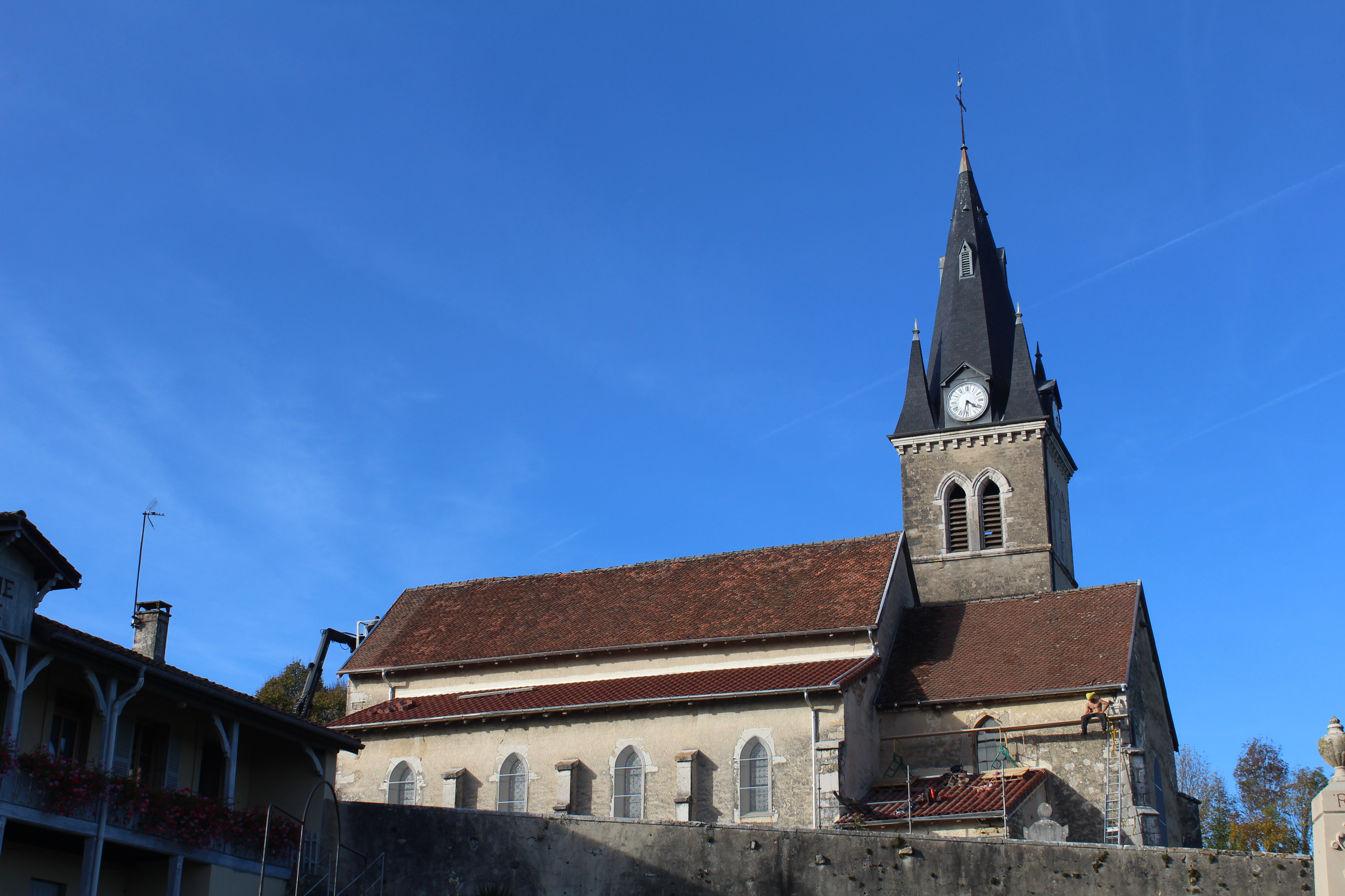 Église Saint-Didier de Rignat.